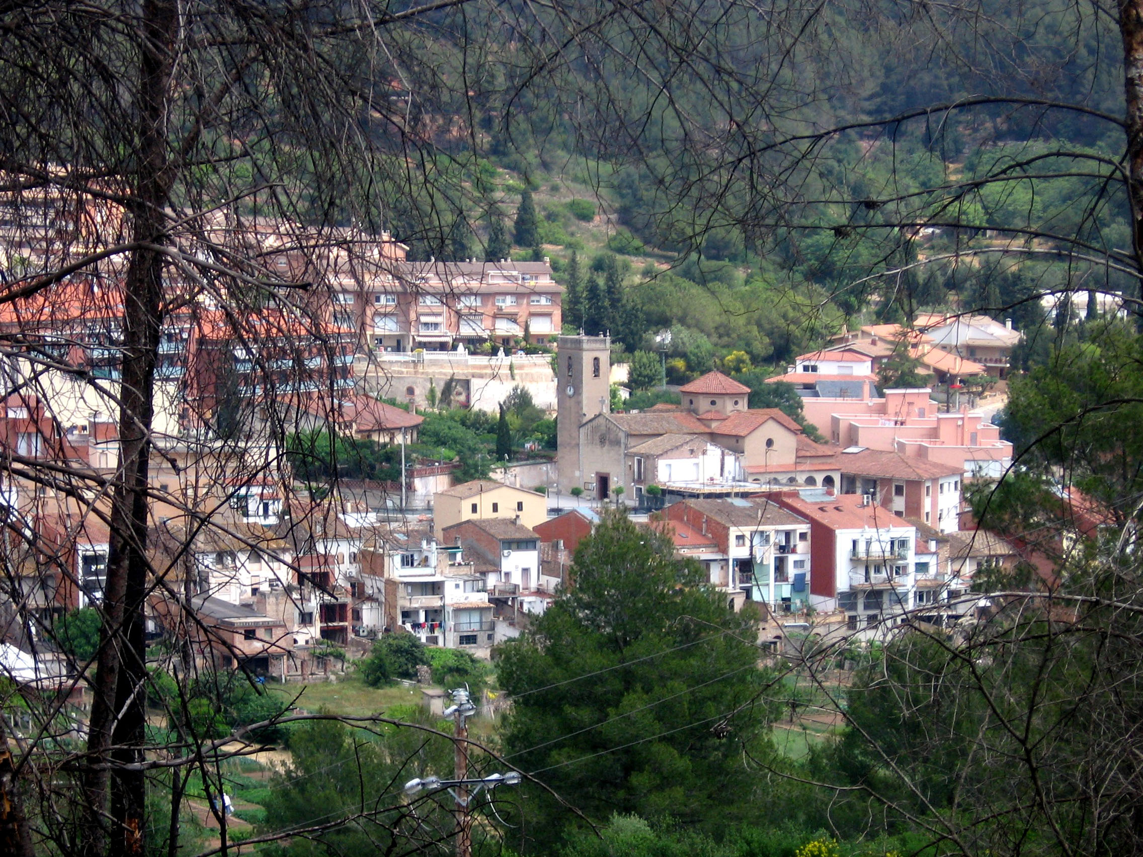 La Palma de Cervelló